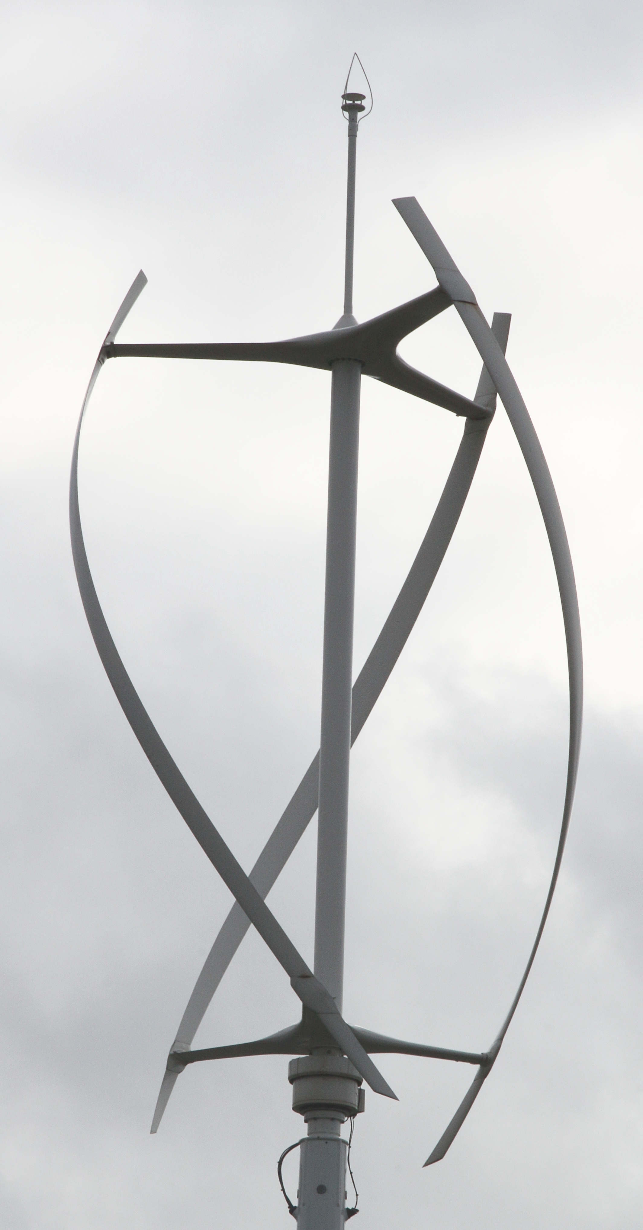 Helgoland, Mikrowindturbine „qr5“ des Wilhelm-Mielck-Hauses